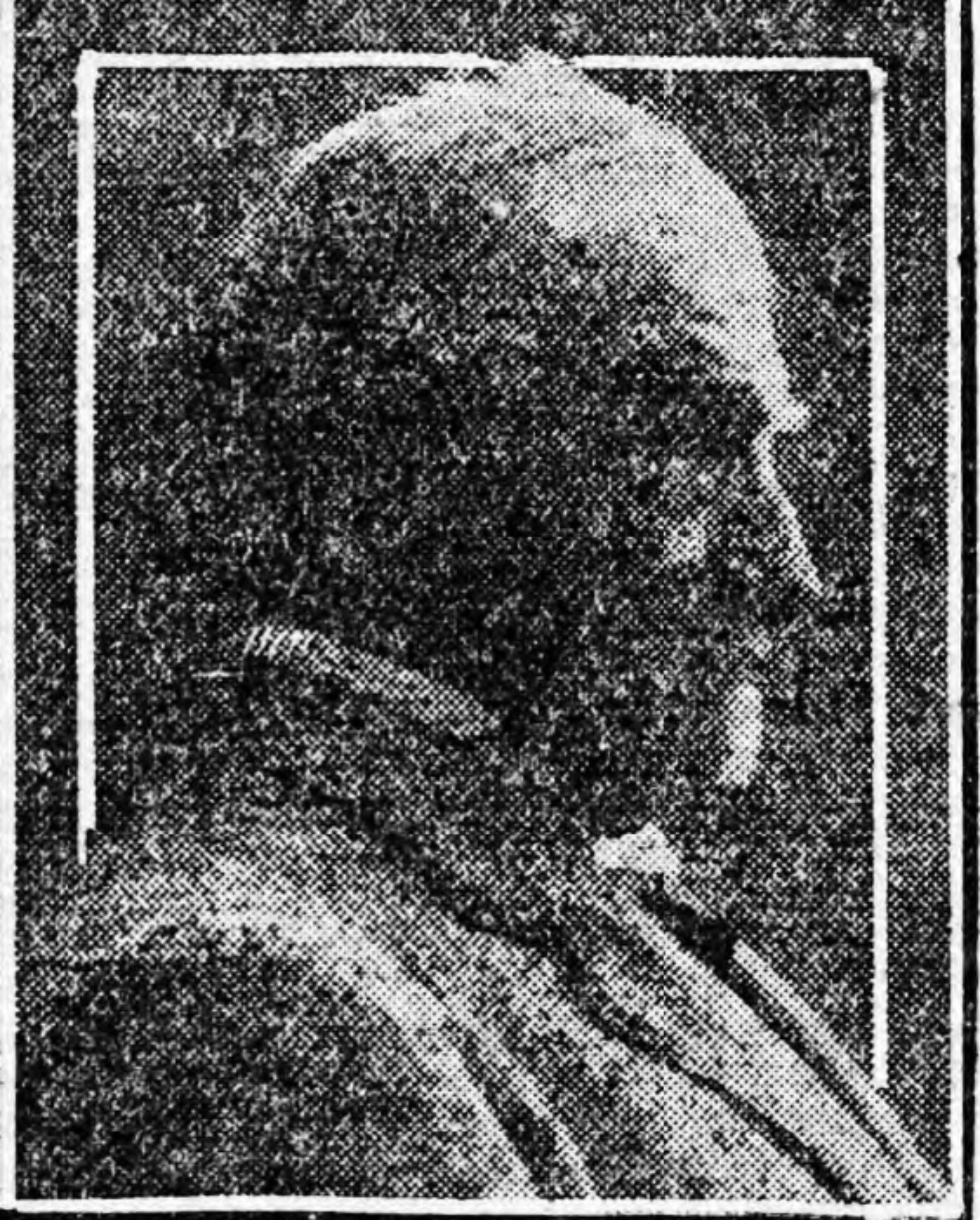 Richard Green-Price